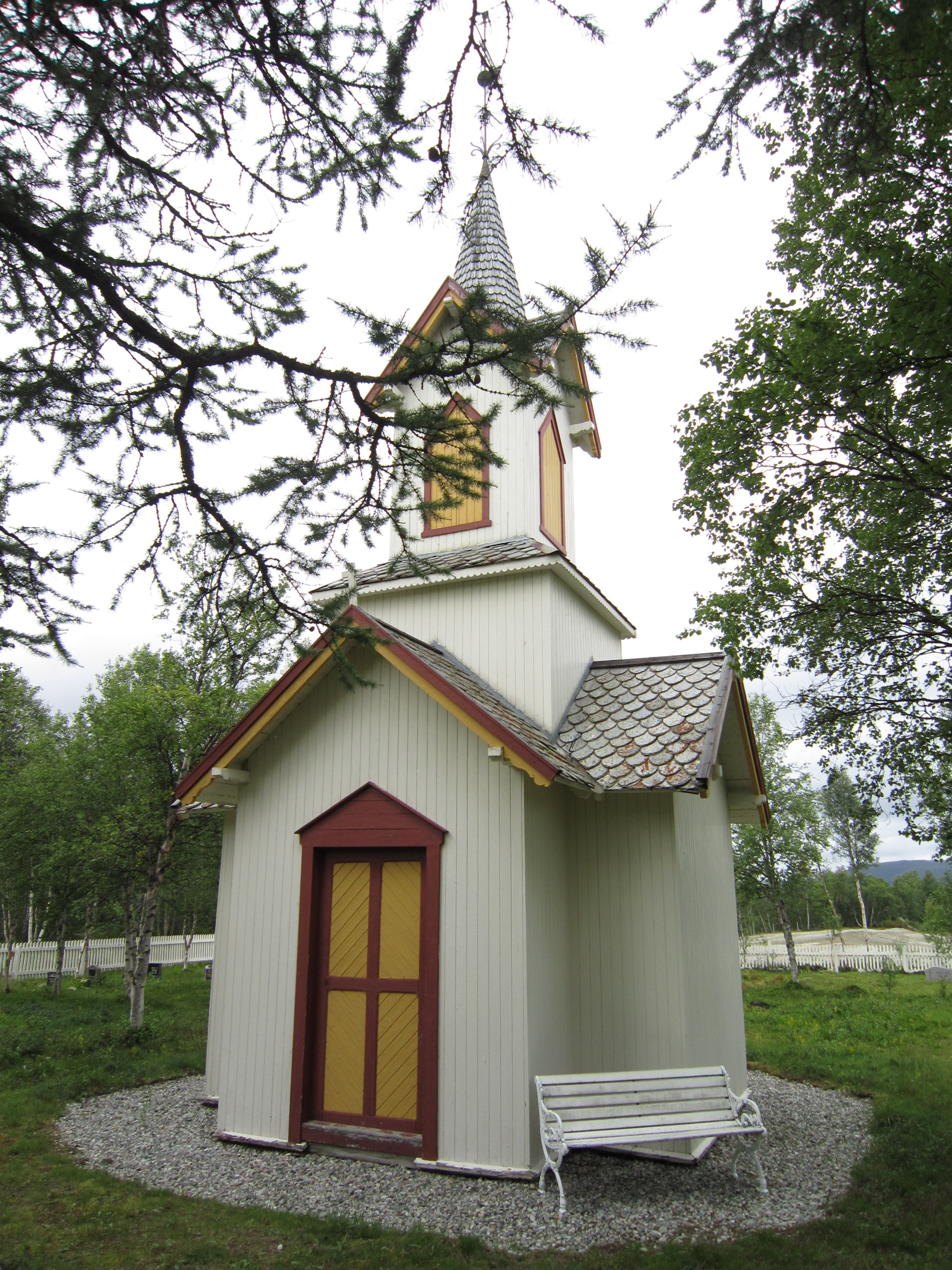 Narjordet kirkegård (Os i Østerdalen)